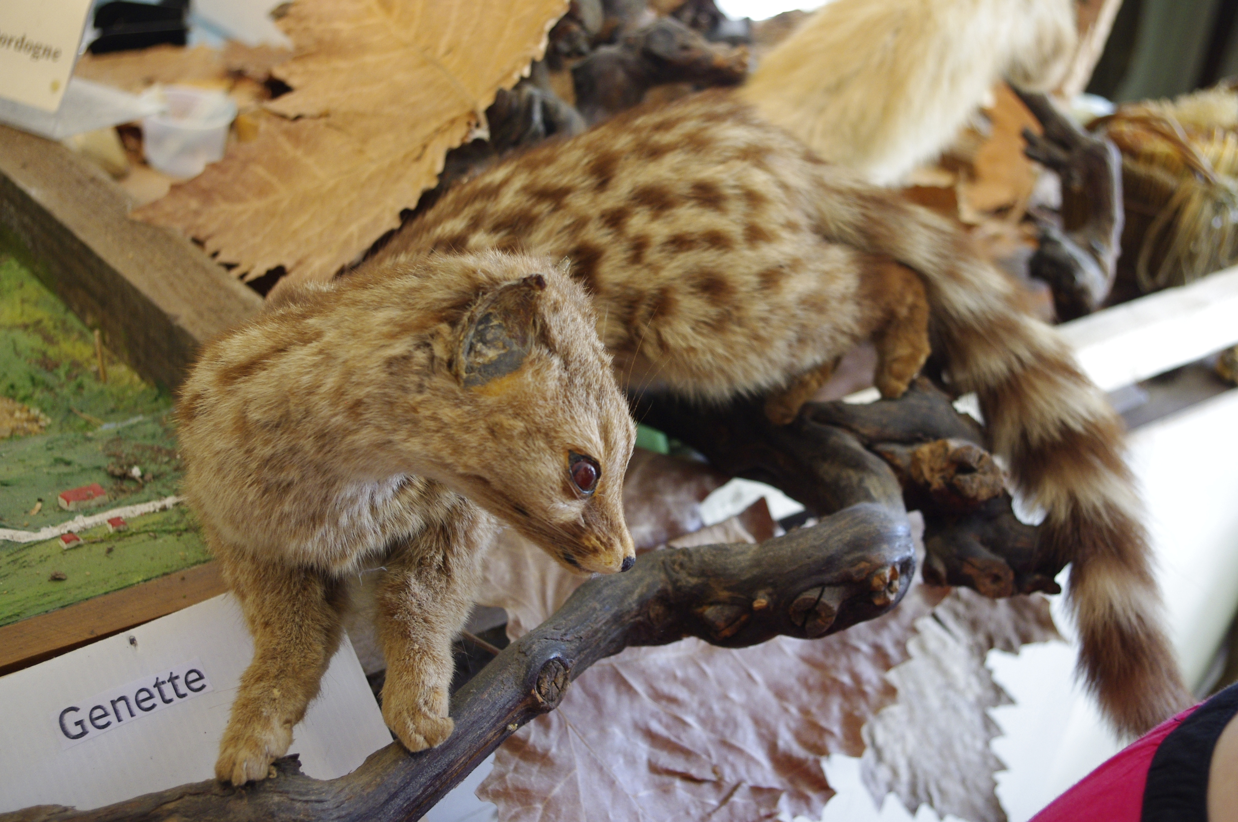 Cité Découverte Nature à Miallet, Dordogne, France. Genette (Genetta genetta) naturalisée